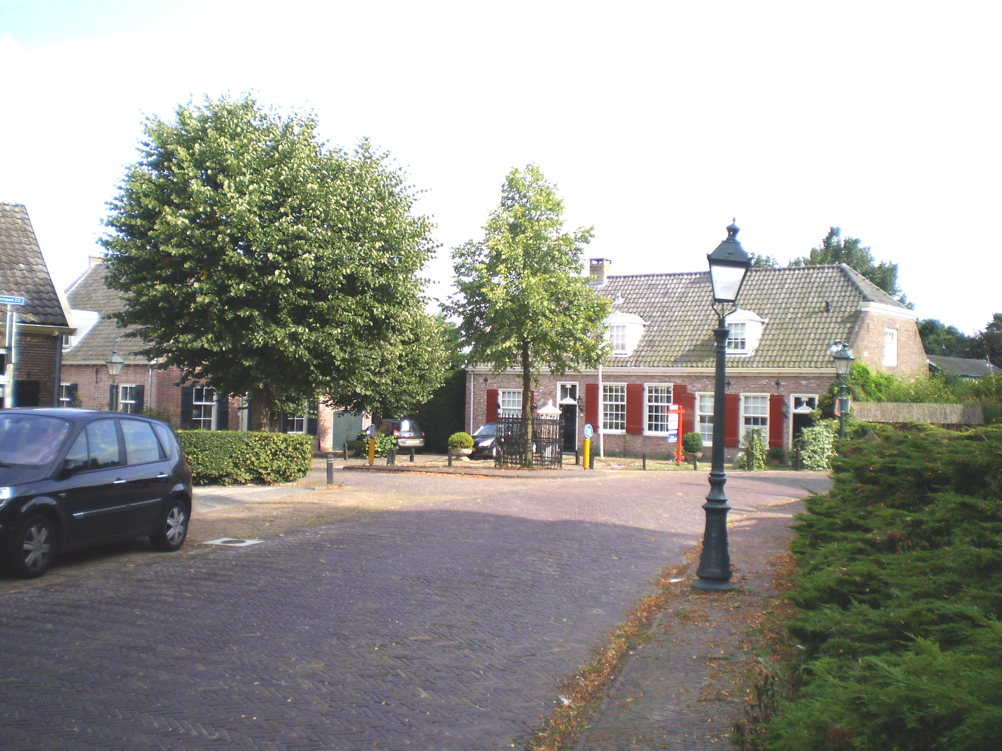 Ald Soest trijesprong